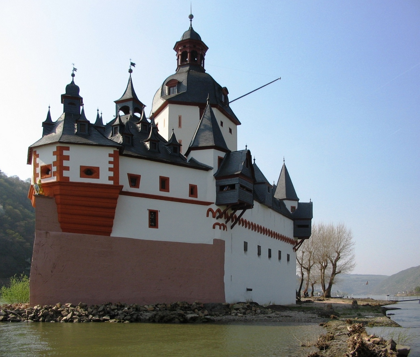 Gesamtansicht der Burg Pfalzgrafenstein von Süden. Zu sehen sind am Bug der Wappenlöwe, darüber die Geschützbastion, an den Ecktürmen zwei der vier Ausguckerker und die Spitze des im Innenhof stehenden fünfeckigen Turms. Im Vordergrund das Leitwerk, das von hier bis zur Insel Kauber Werth reicht. Im Hintergrund die Insel, auf der die Burg errichtet wurde und die Anlegestelle für das Fährboot nach Kaub